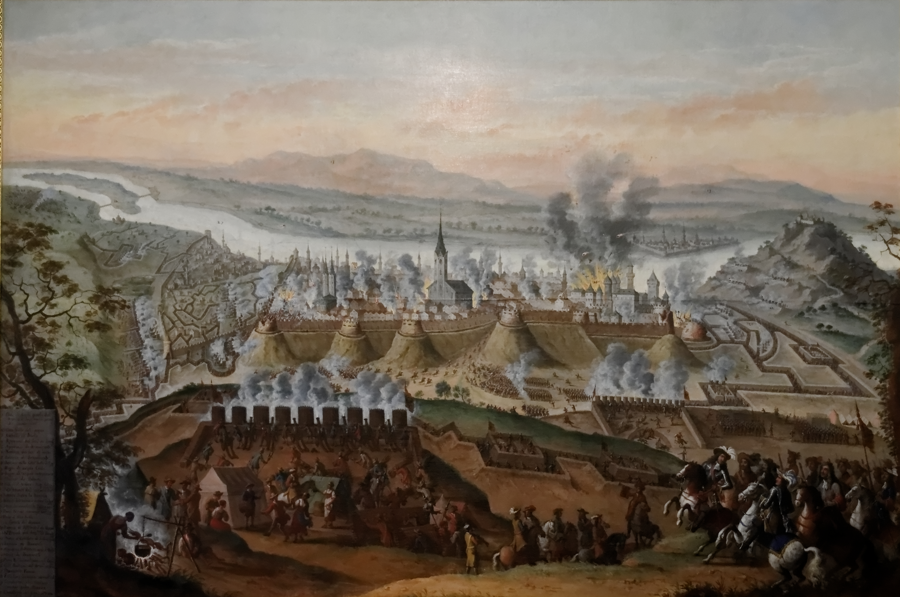 Battle of Buda (1686).label QS:Len,"Battle of Buda (1686)." label QS:Lfr,"Siège de Buda par les autrichiens en 1686"